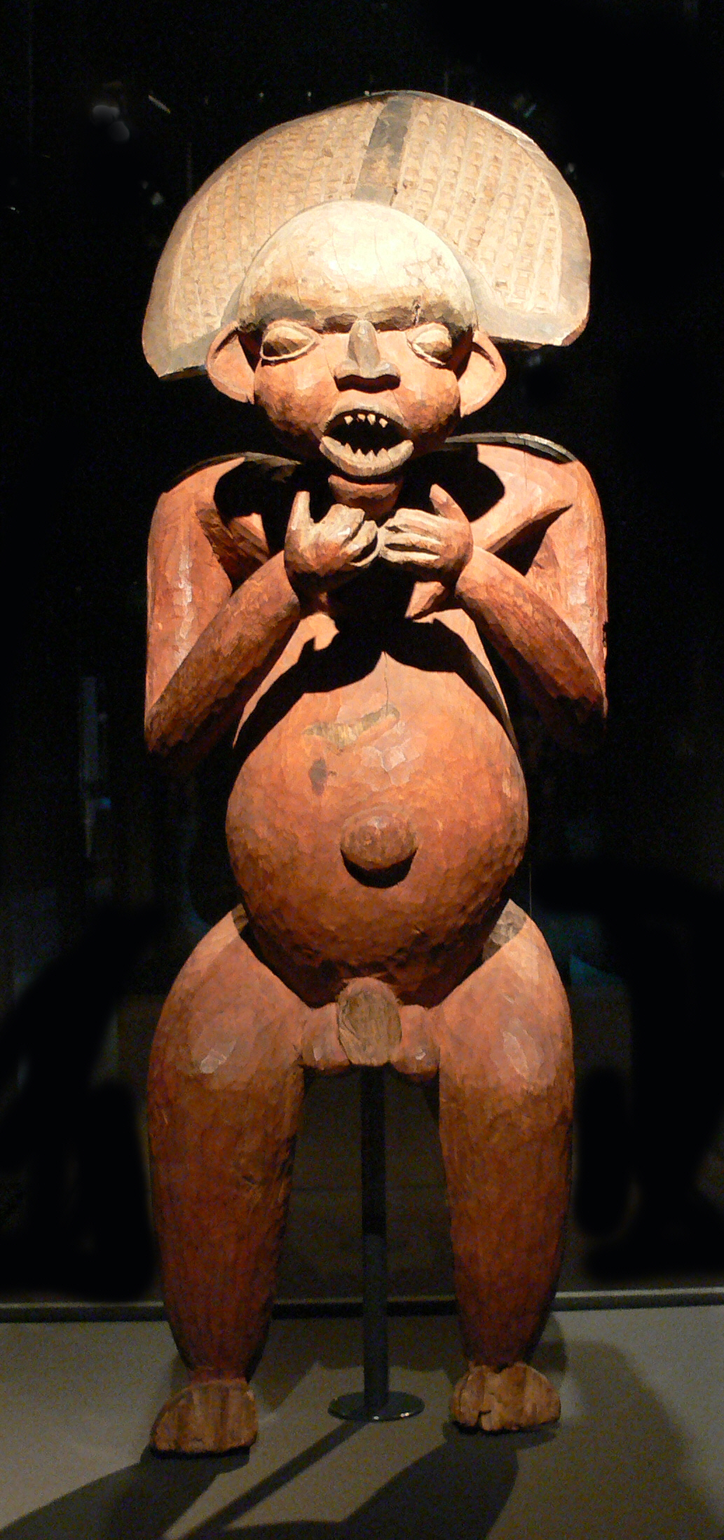 Gedenkfigur eines Königs oder Würdenträgers, Kamerun, Bangu, 19. Jahrhundert, Holz Collection: Ethnologisches Museum, Berlin-Dahlem (Sammlung Hans Glaunig, erworben 1907), III C 21058